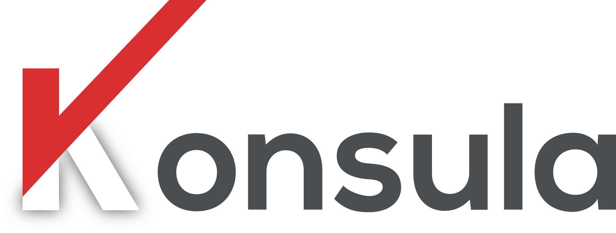 Logo Konsula